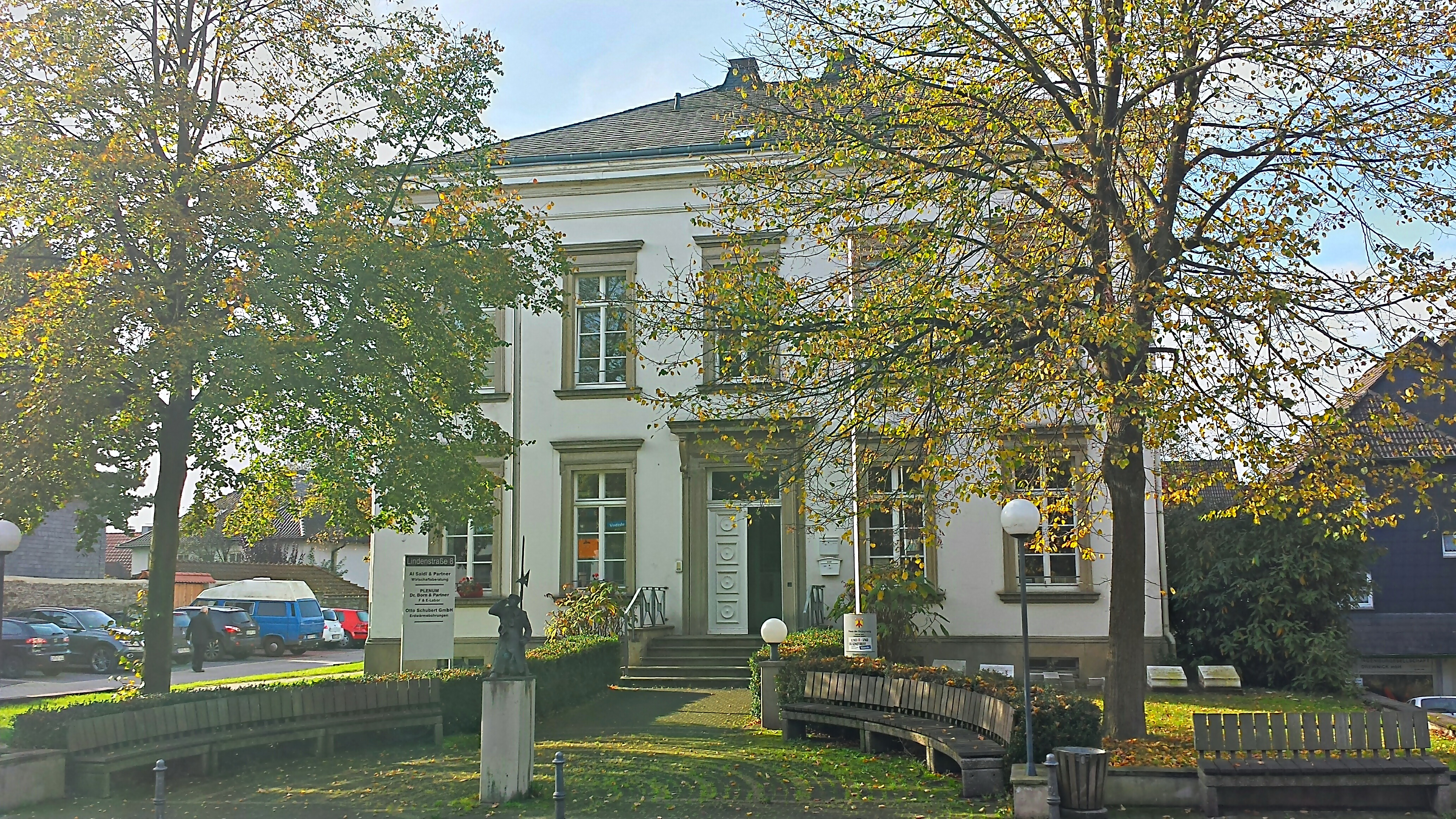 Haus der Begegnung, Lindenstraße 8 in Ennepetal-Voerde am 27.10.2014